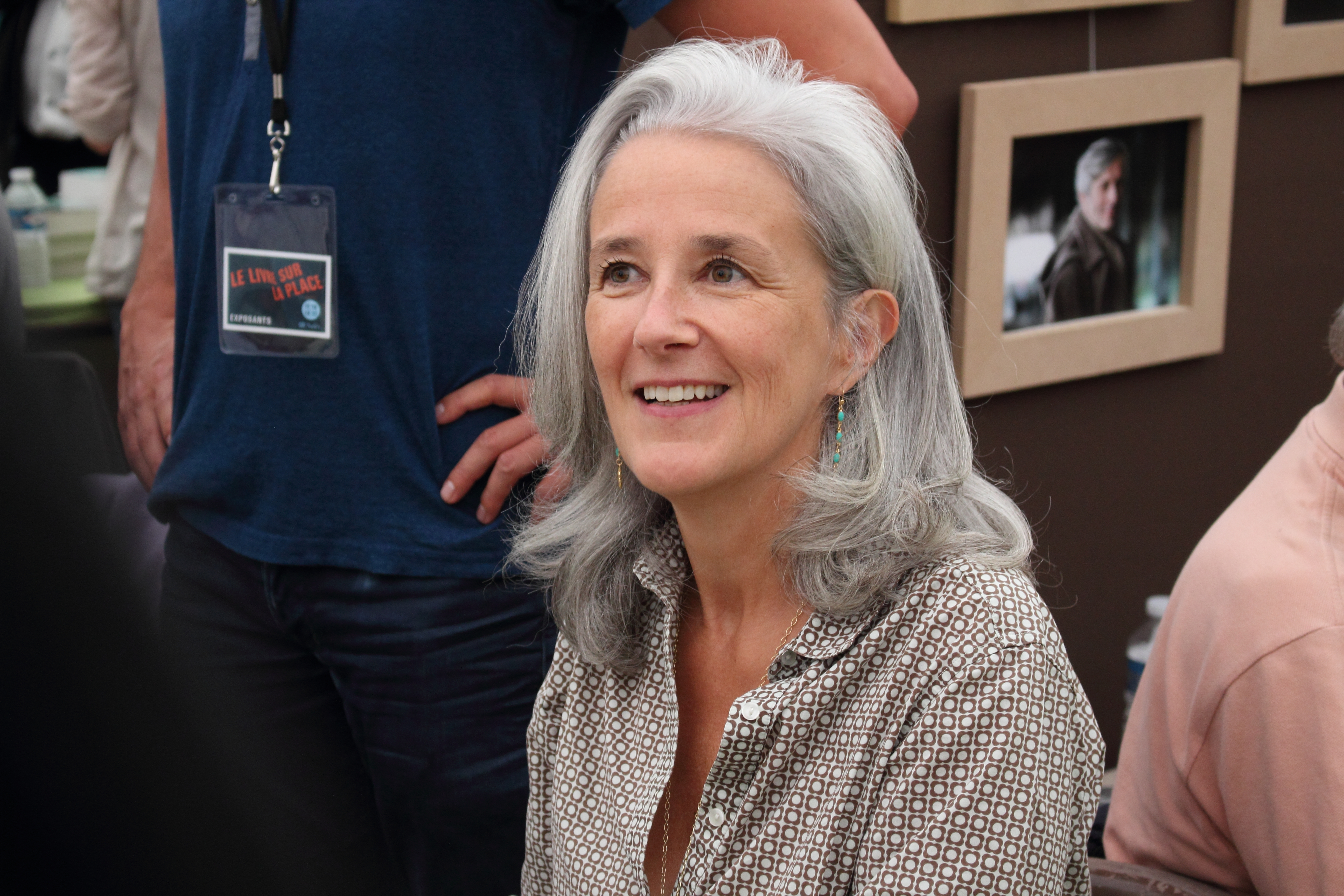 Tatiana de Rosnay - Le Livre sur la Place